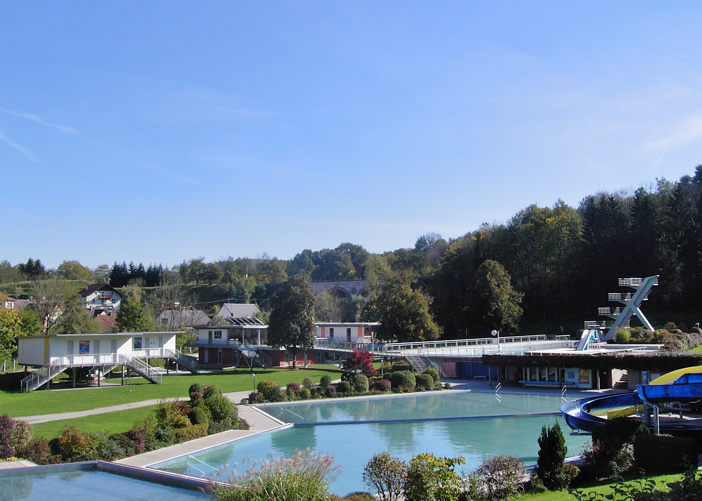 Steyr Haratzmüllerstraße 126, Stadtbad, Außenbereichsbauten, Blickrichtung Süden